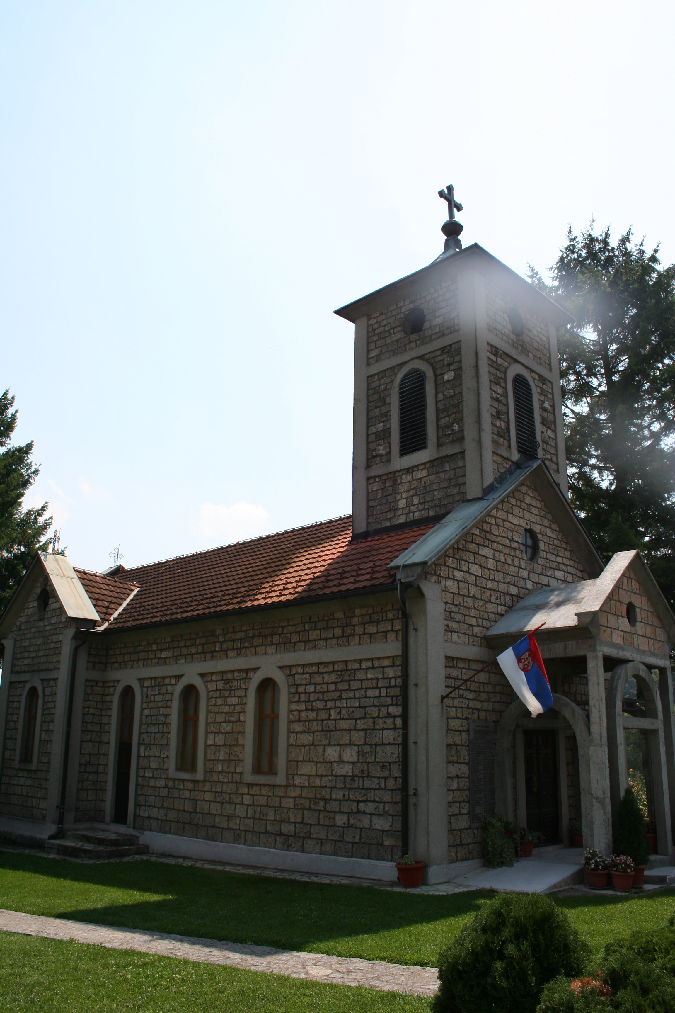 Crkva Sv. Ilije, Donja Borina